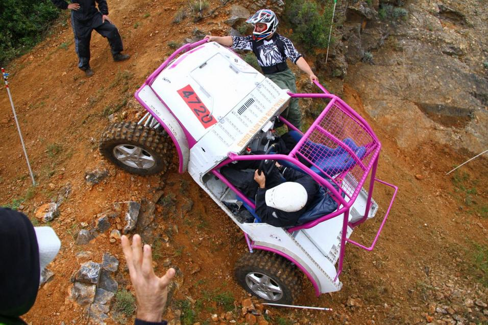 Trial de Baixas § Bernard Auda § Catégorie Buggy